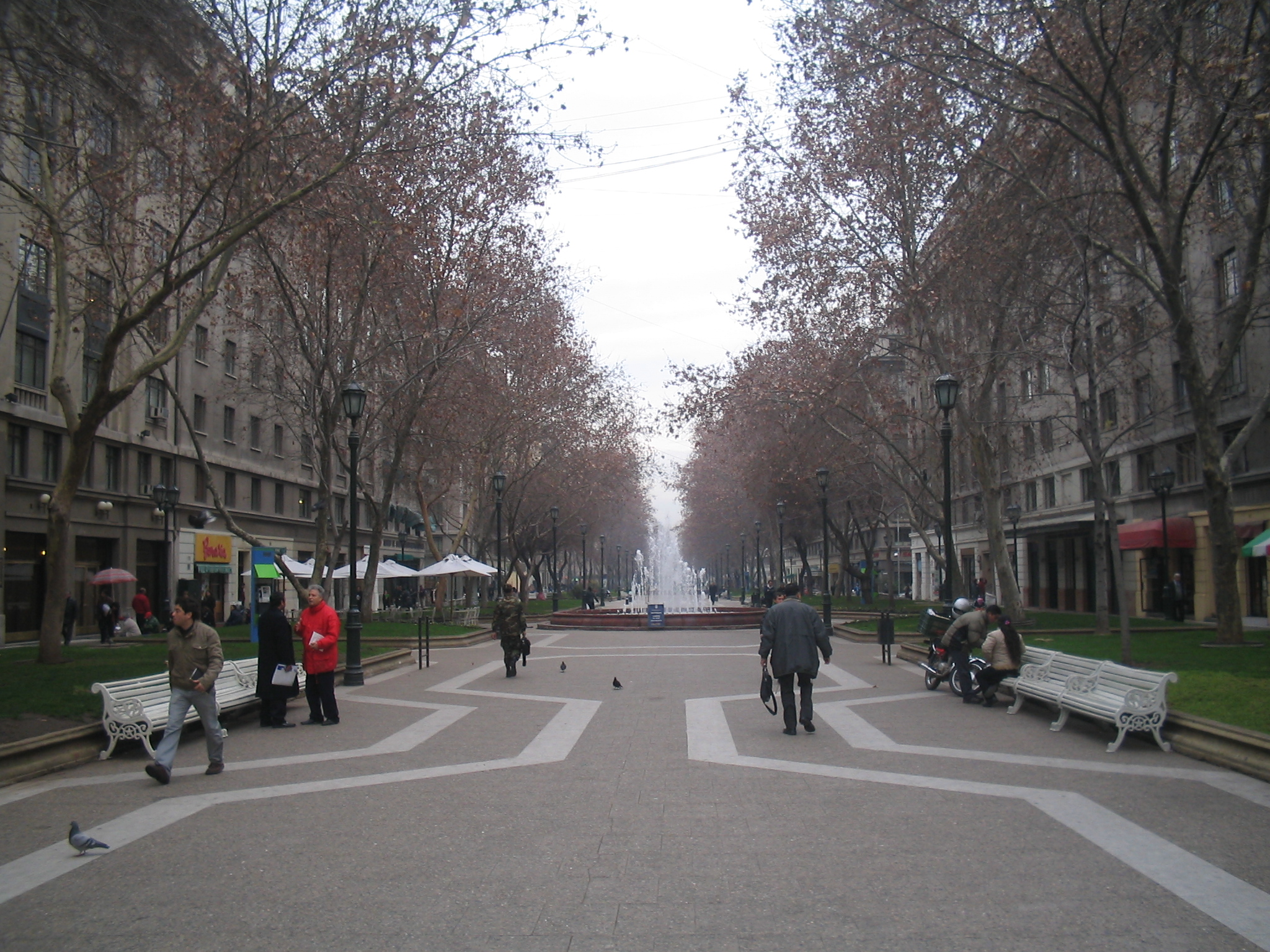 Paseo Bulnes, Santiago de Chile